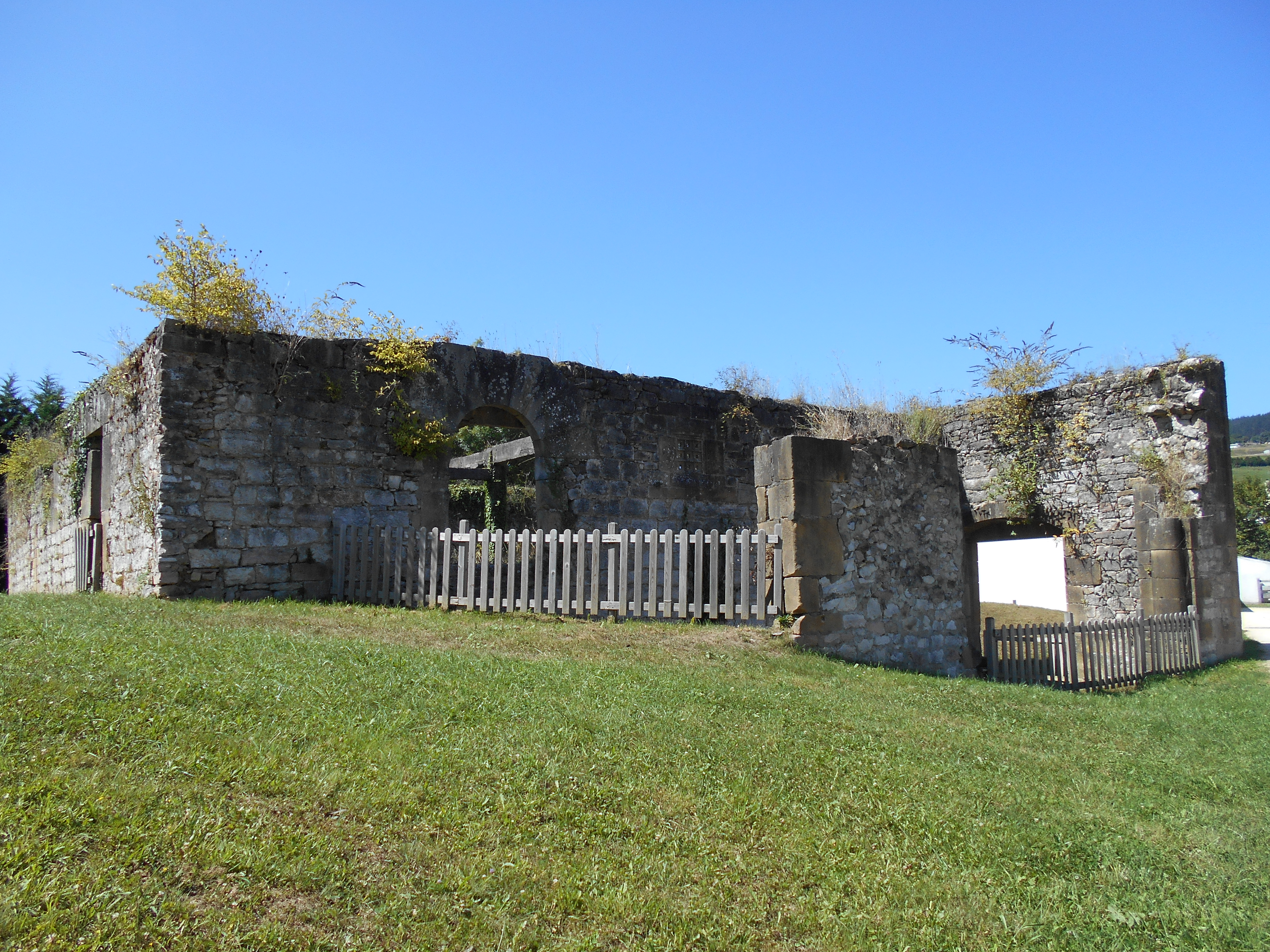 Ruinas de la torre de Zaldibar en la zona de Olazar